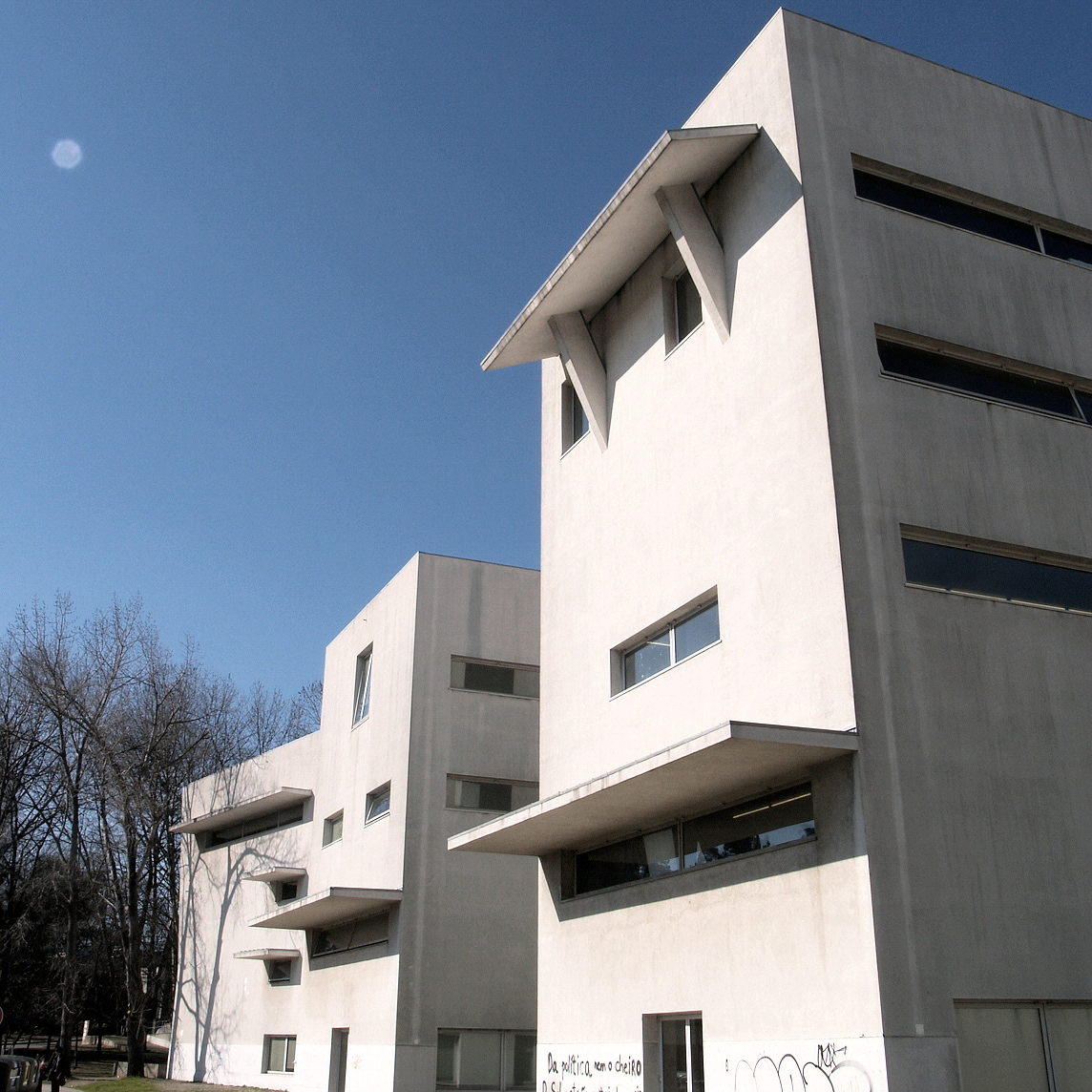 Faculdade de Arquitectura da Universidade do Porto - architect: Siza Vieira